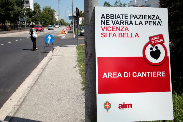 Campagna informativa AIM-comune di Vicenza